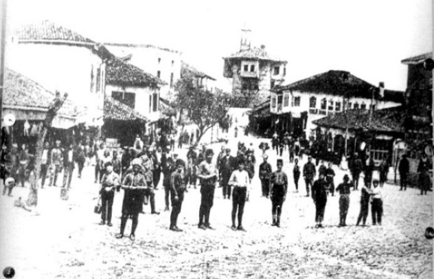 Qendra e Gjilanit, sahat kulla